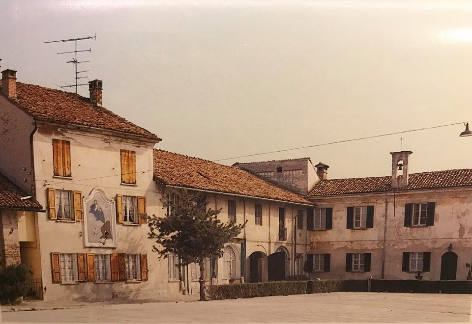 Foto risalente agli anni '80